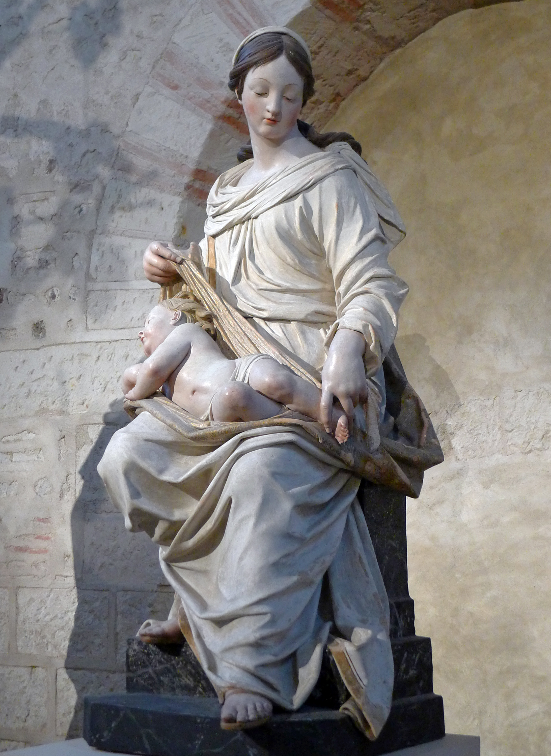 Statue Vierge à l'enfant dite de Nozé